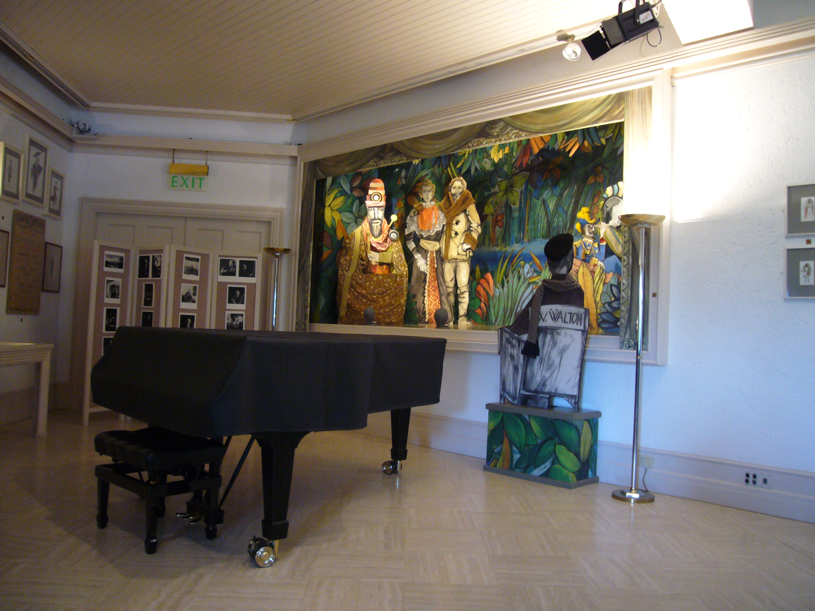 Forio d'Ischia, Giardini La Mortella: sala recite del museo Walton. Il teatrino è di Lele Luzzati.